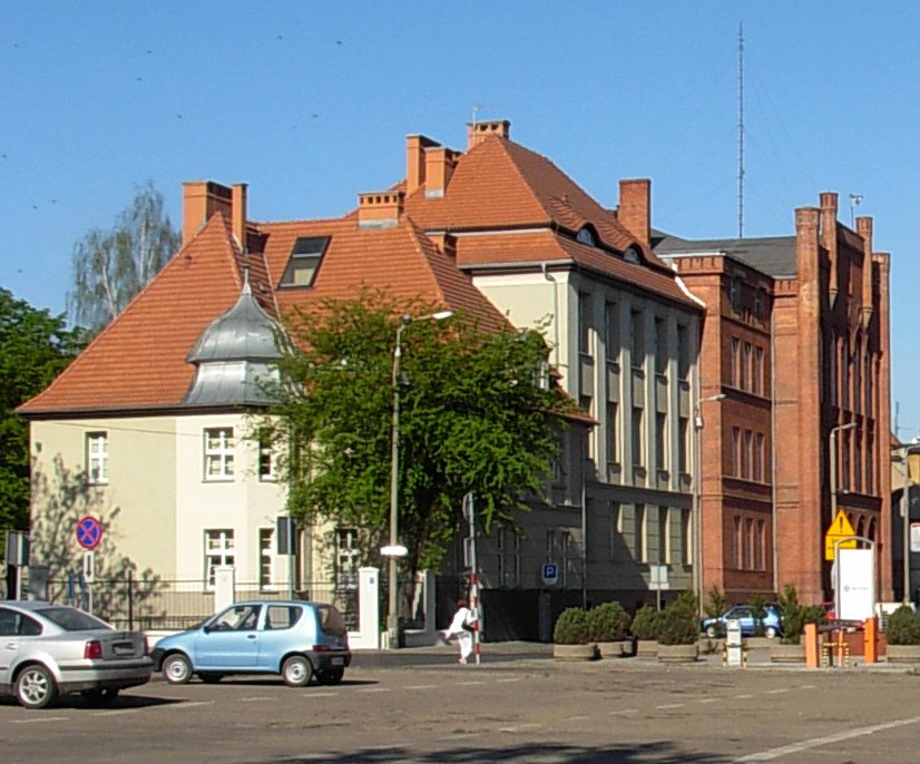 Budynek Seminarium Duchownego w Bydgoszczy, 1858 r.